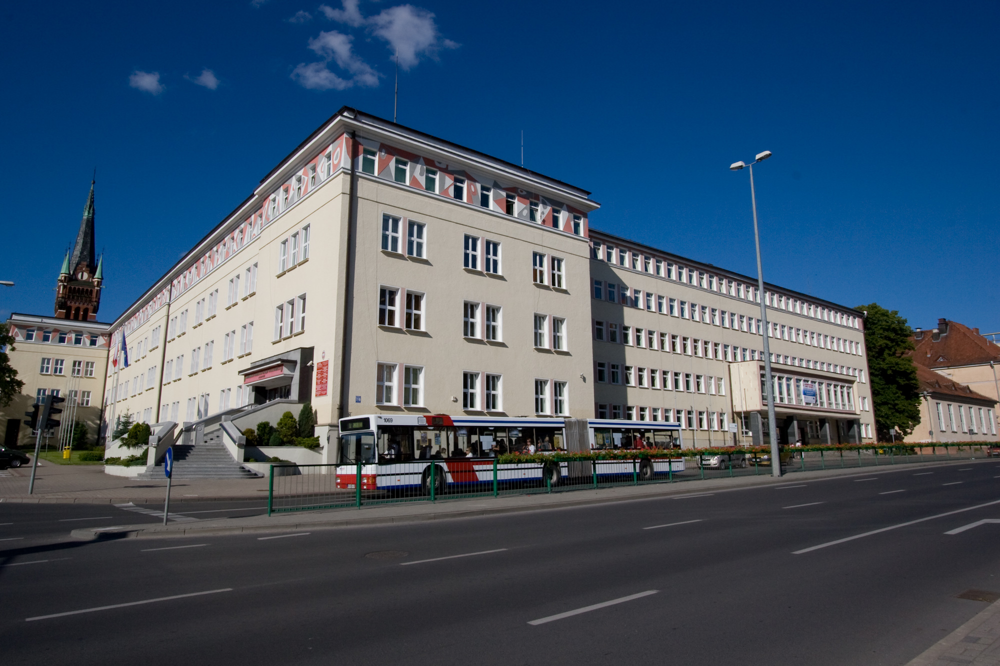 Olsztyn, Aleja marsz. Józefa Piłsudskiego 7/9 - Warmińsko-Mazurski Urząd Wojewódzki